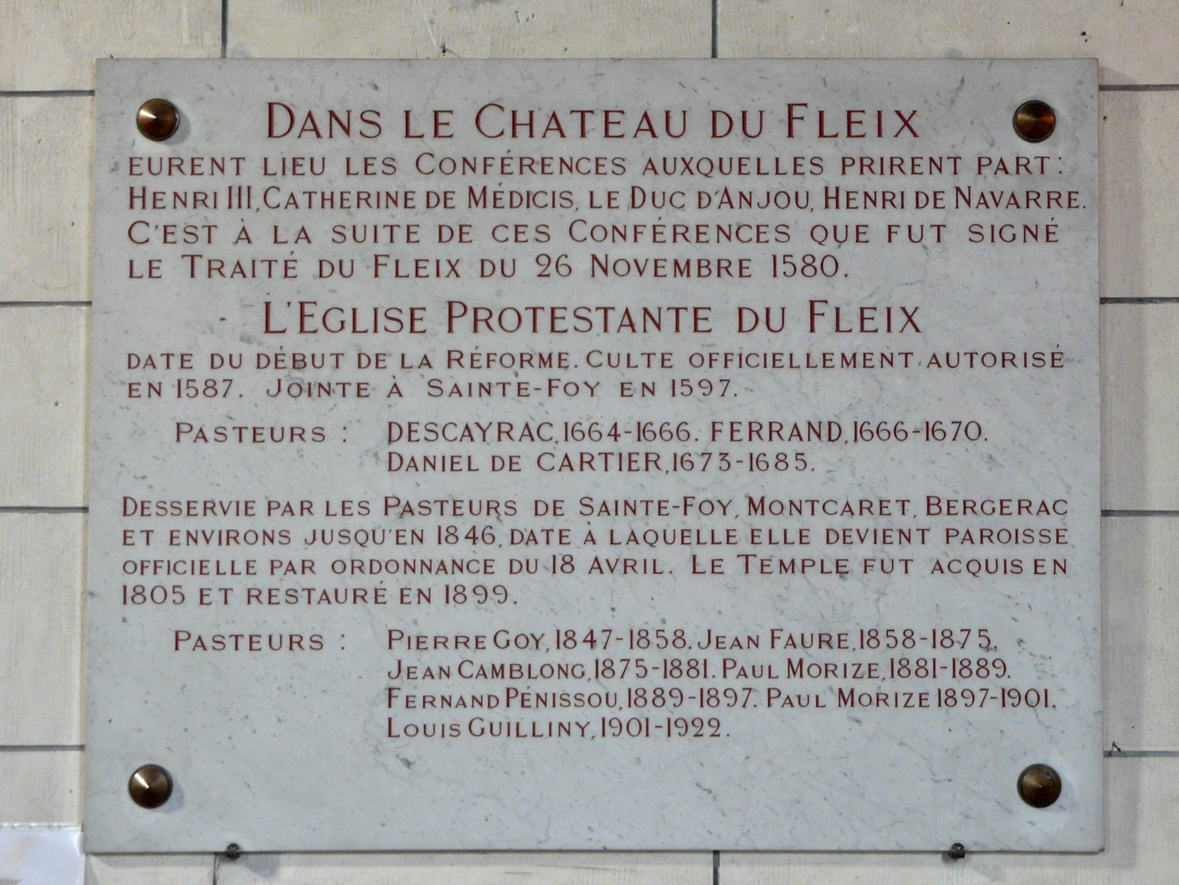 Plaque à l'intérieur du temple du Fleix, Dordogne, France.